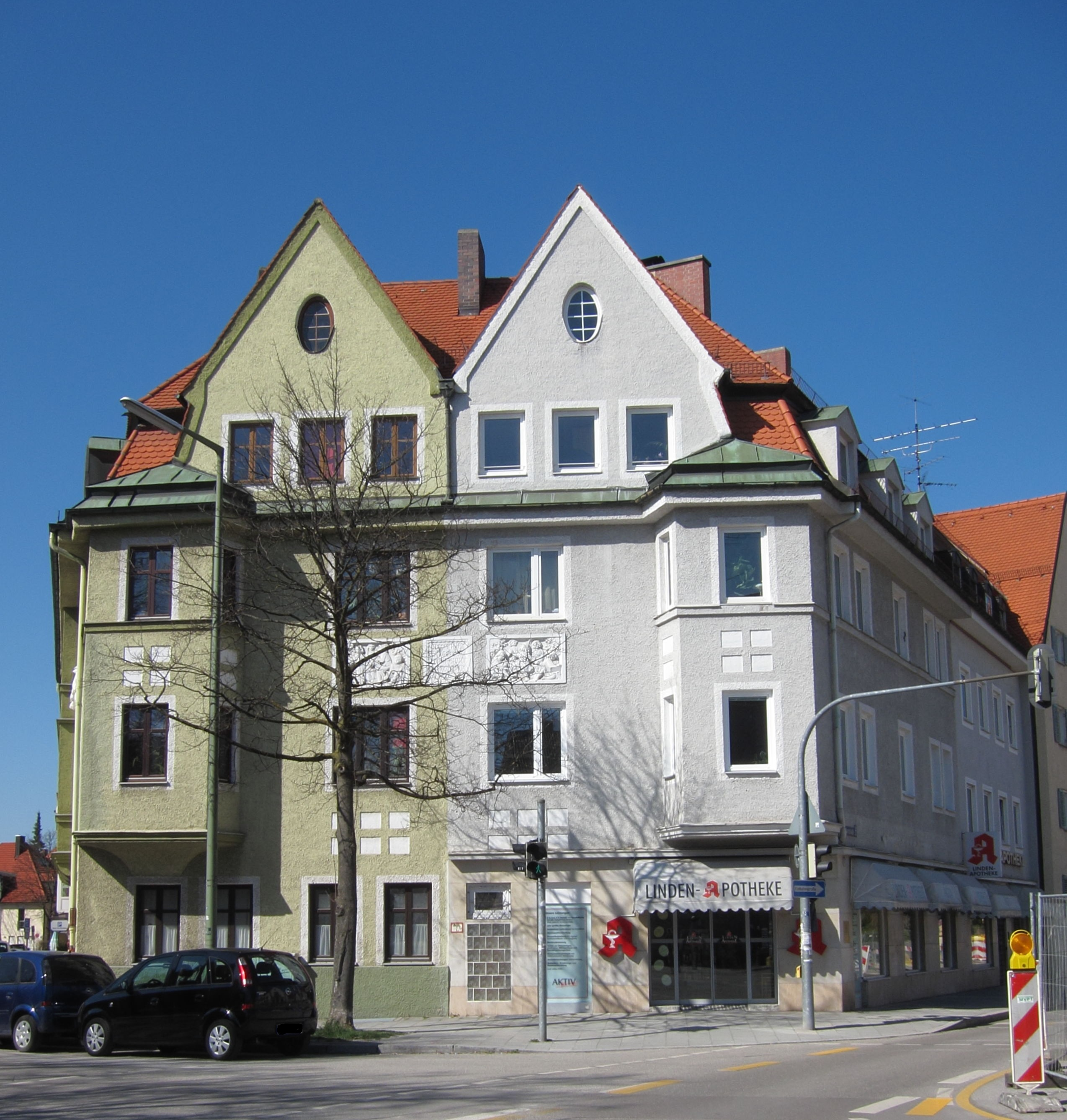 Bäckerstraße 22; Mietshaus, barockisierender Eckbau, 1910; Gruppe mit Josef-Retzer-Straße 42.